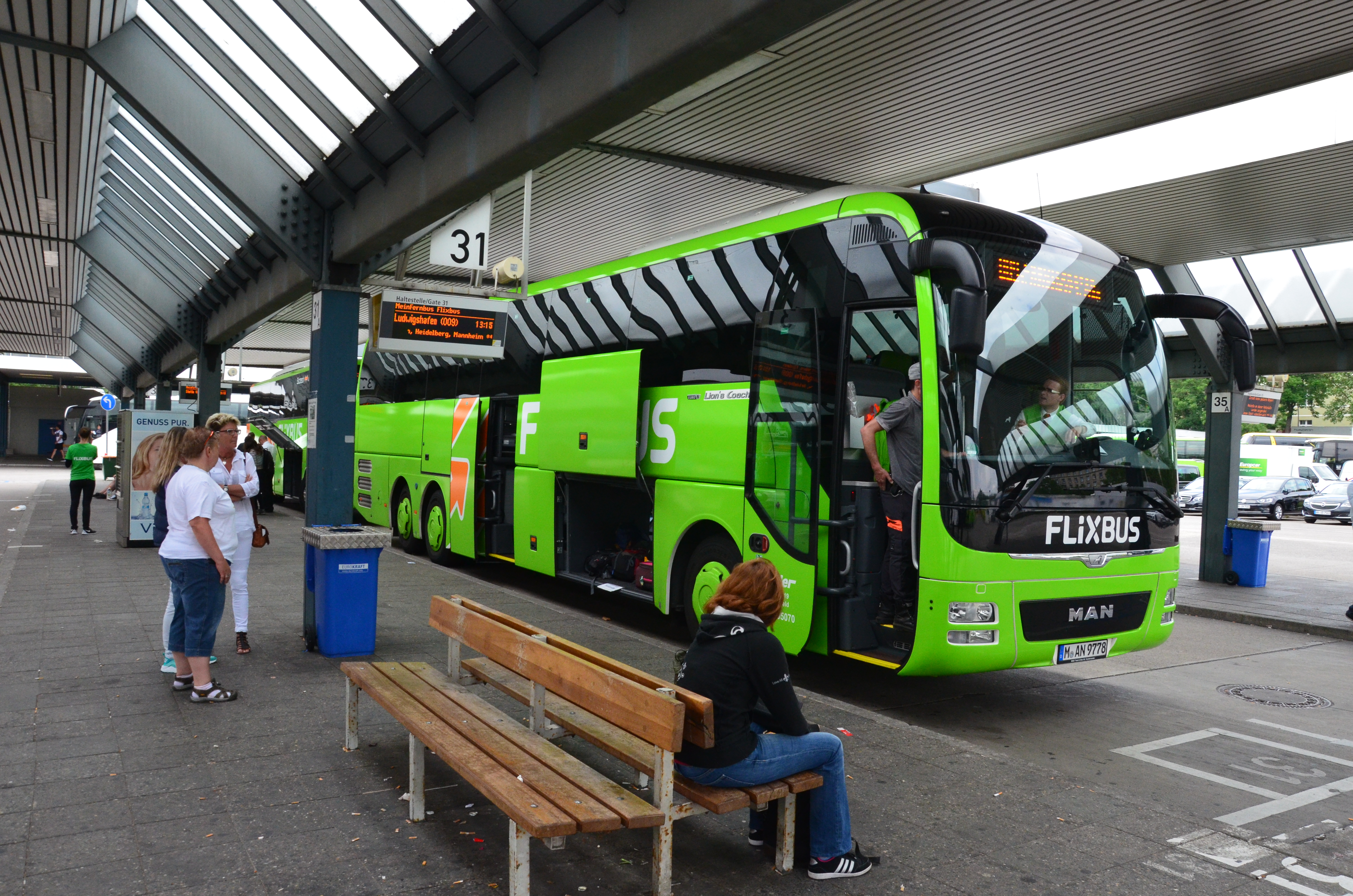 MAN Lion's Coach de la compagnie Flixbus, à Berlin Messe (ZOB).